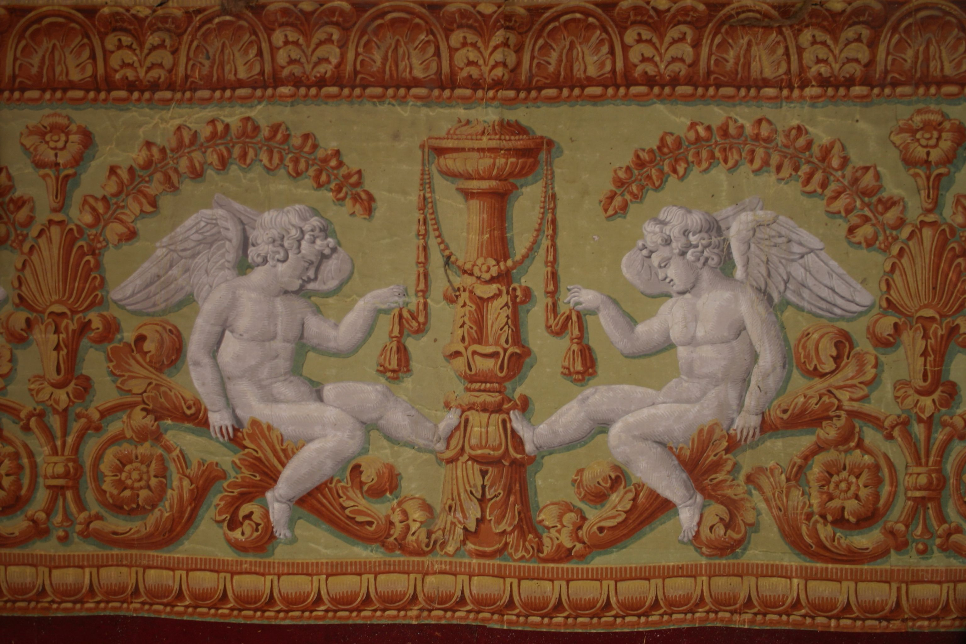 Detail aus der oberen Bordüre der Musikzimmertapete vor Konservierung mit Engelmotiv im 10farbigen Handdruck.